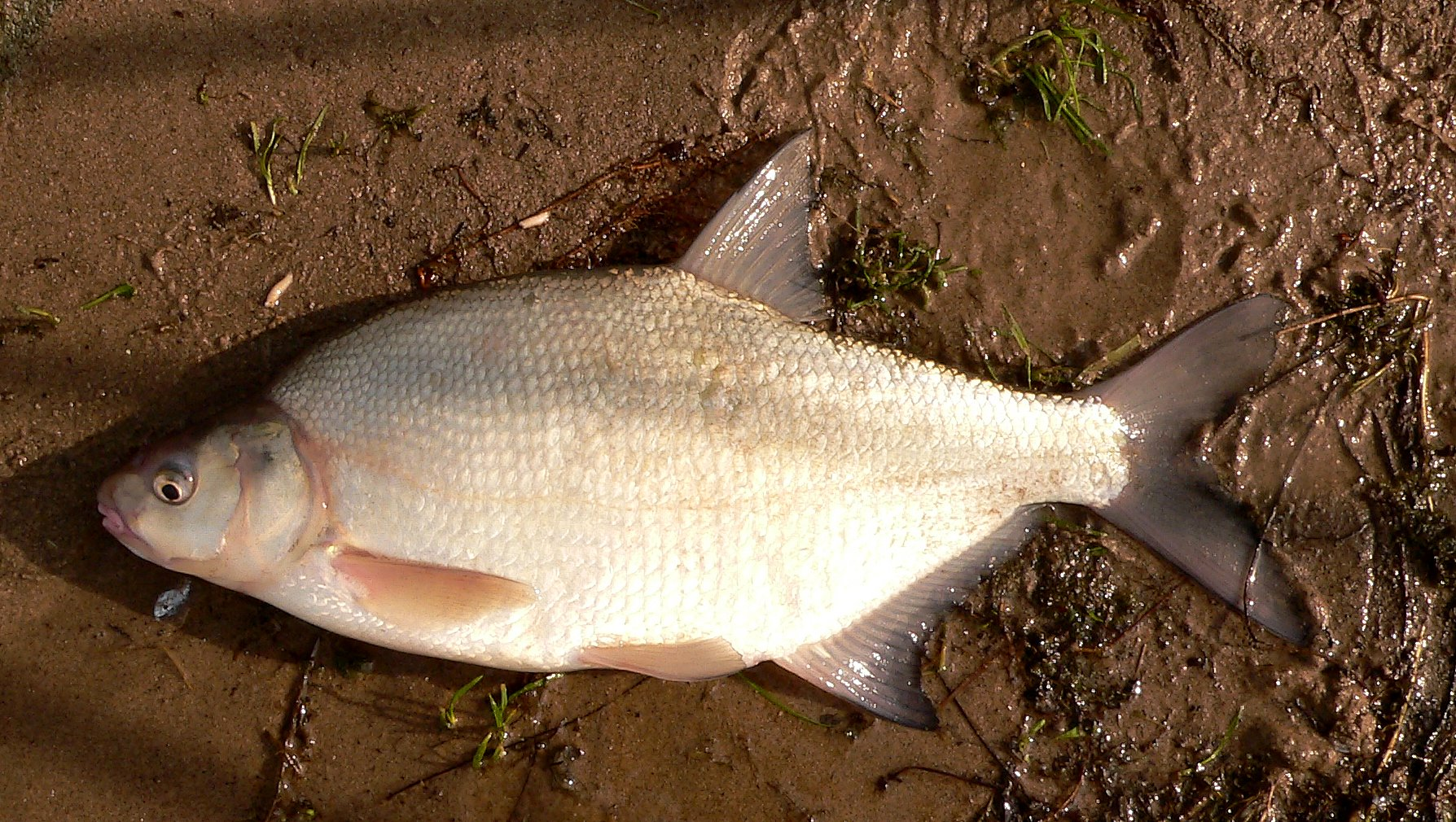 Carp Bream, Nederrijn, Gelderland 42 cm